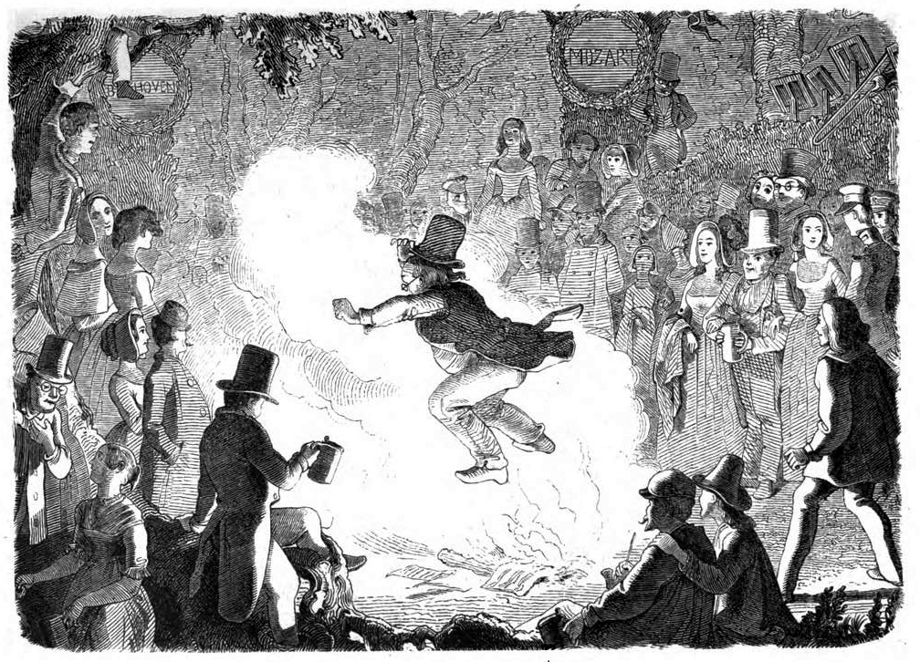 Johannissprung der Münchener Liedertafel